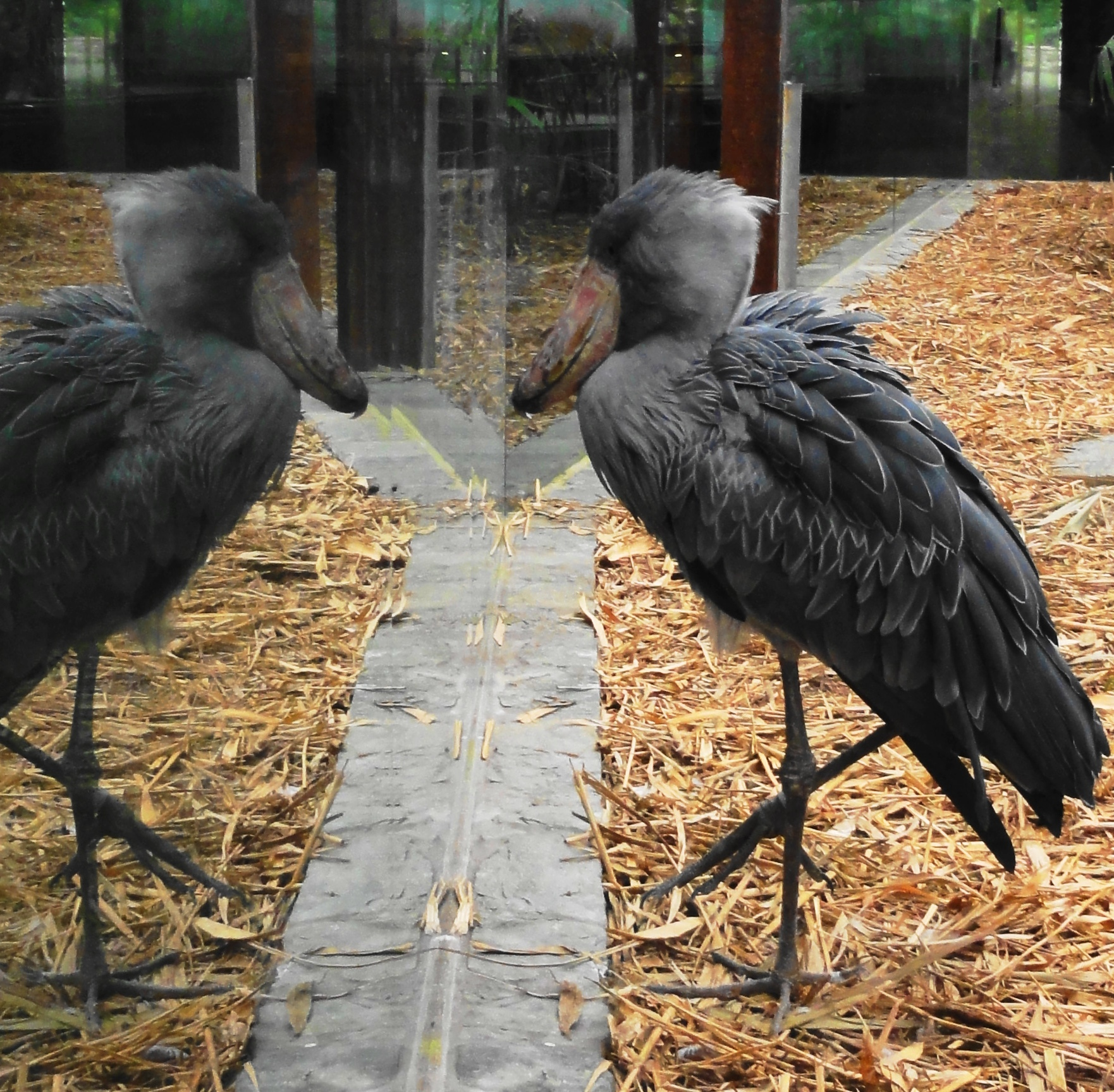 Balaeniceps rex